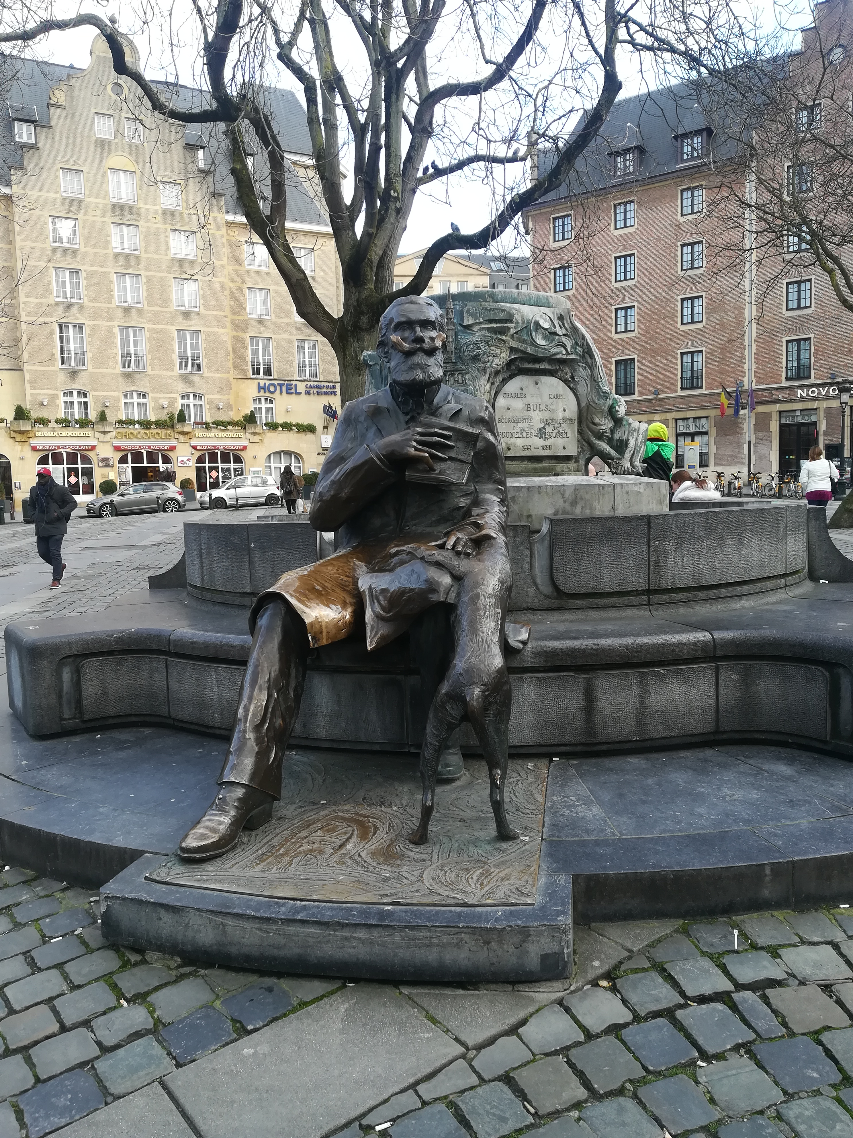 Place de l'Agora à Bruxelles.